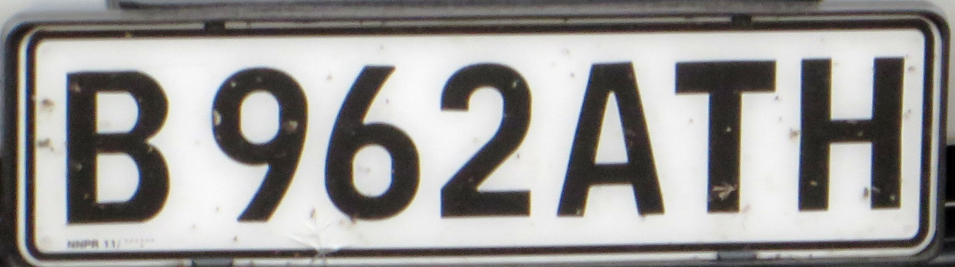 Kentekenplaat uit Botswana